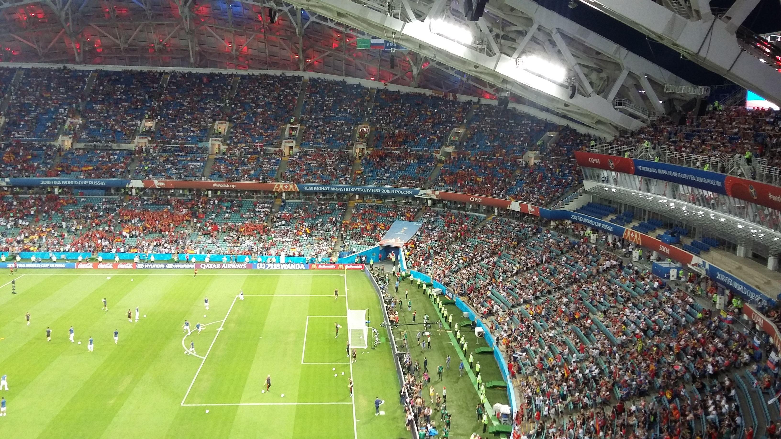 Перед матчем Португалия - Испания 15 июня 2018